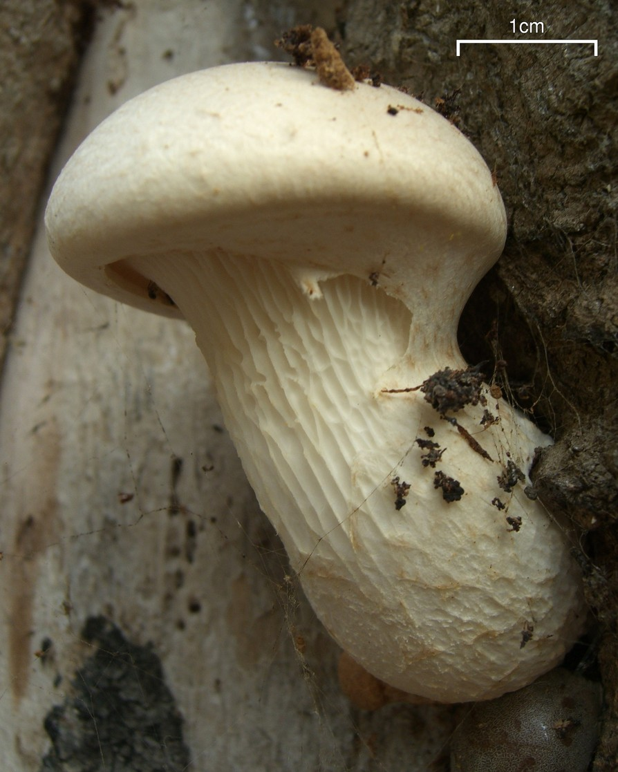 Pleurotus dryinus 20091027.3 US, NC, Nantahala Gorge